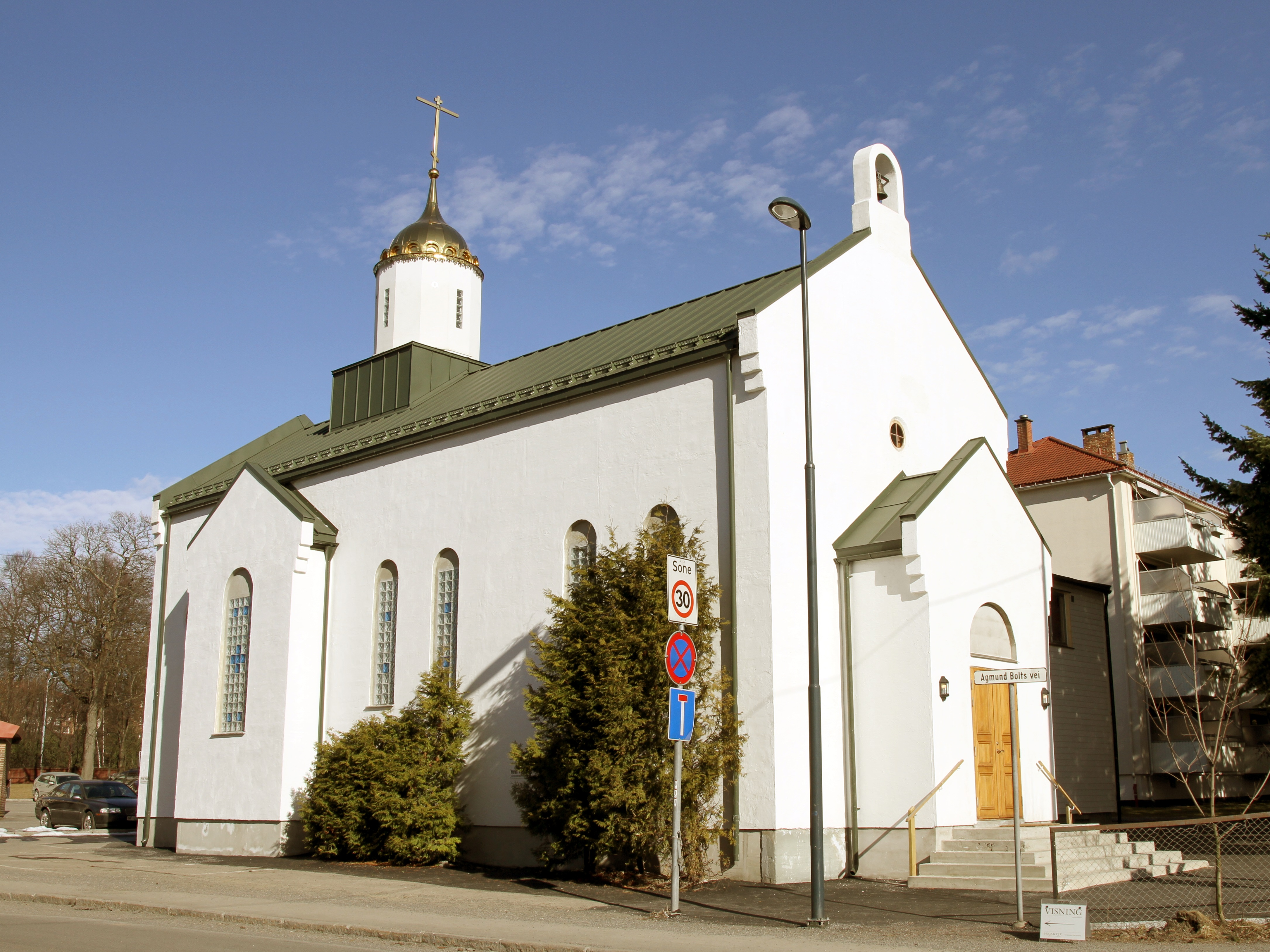 Hellige Nikolai kirke